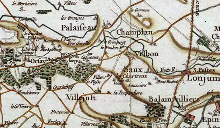 Carte de Cassini représentant Villebon-sur-Yvette (Vilbon)